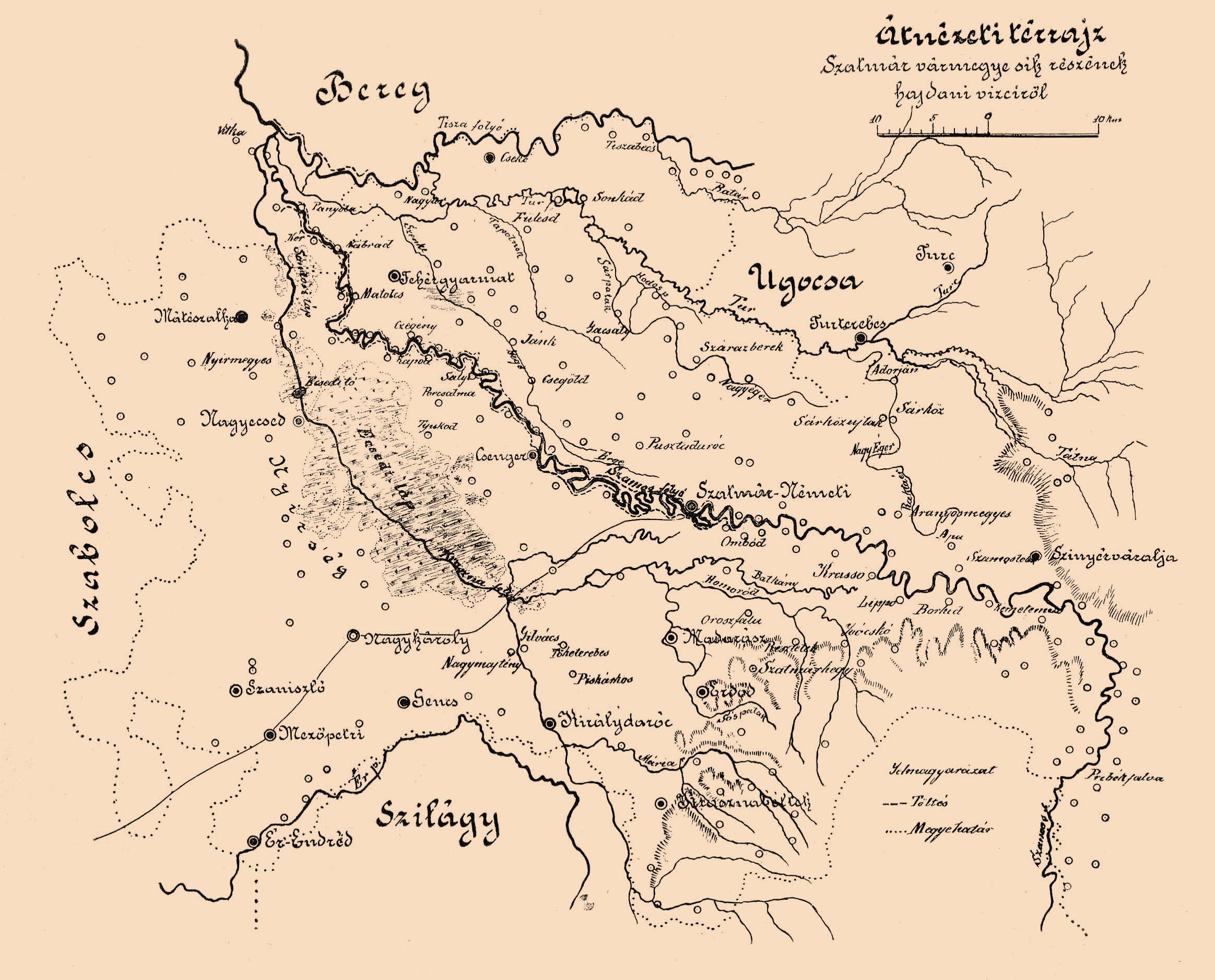 Borovszky Samu: MAGYARORSZÁG VÁRMEGYÉI ÉS VÁROSAI - Átnézeti kézrajz Szatmár vármegye sík részének hajdani vizeiről.